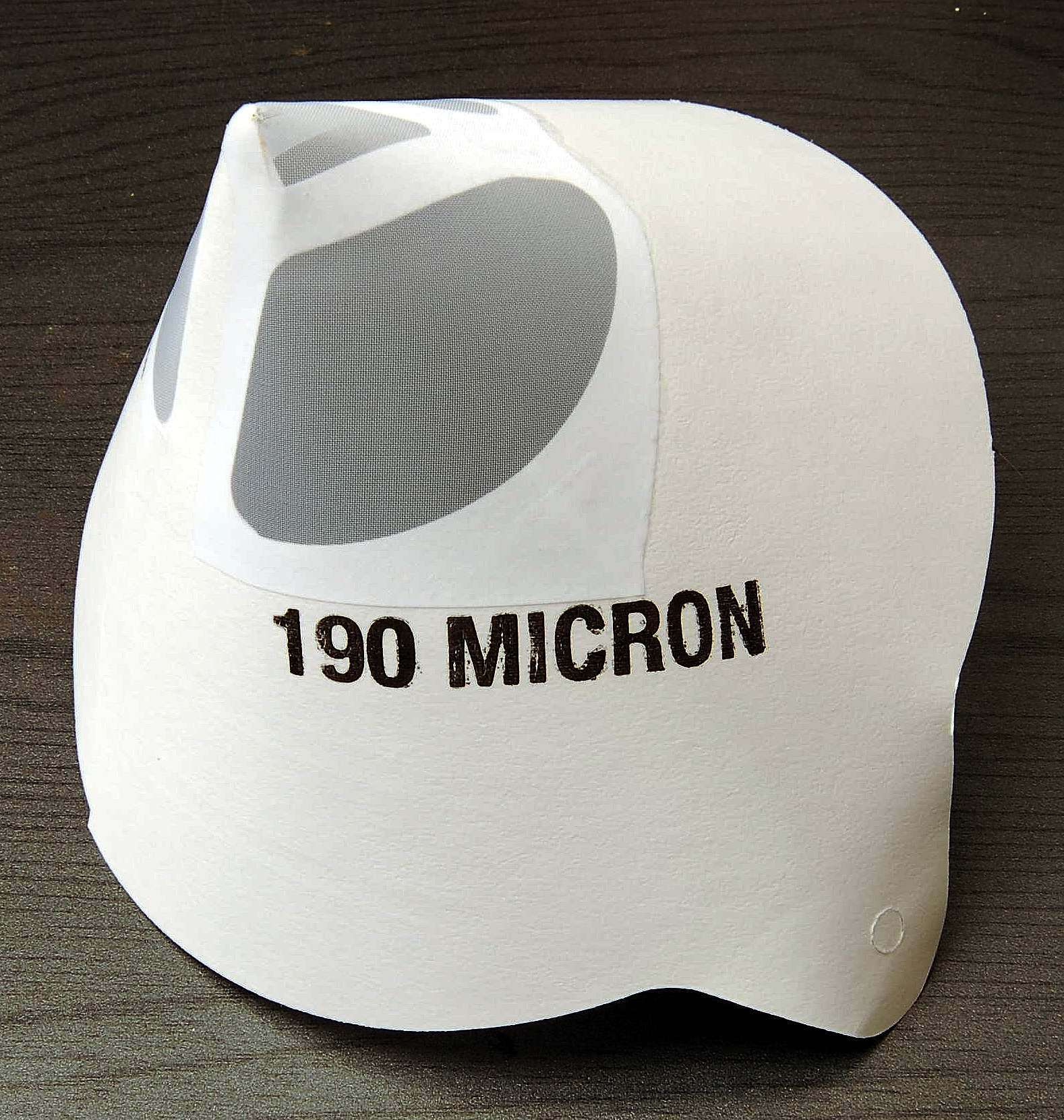 Lacksieb, Papier, 190 mikron